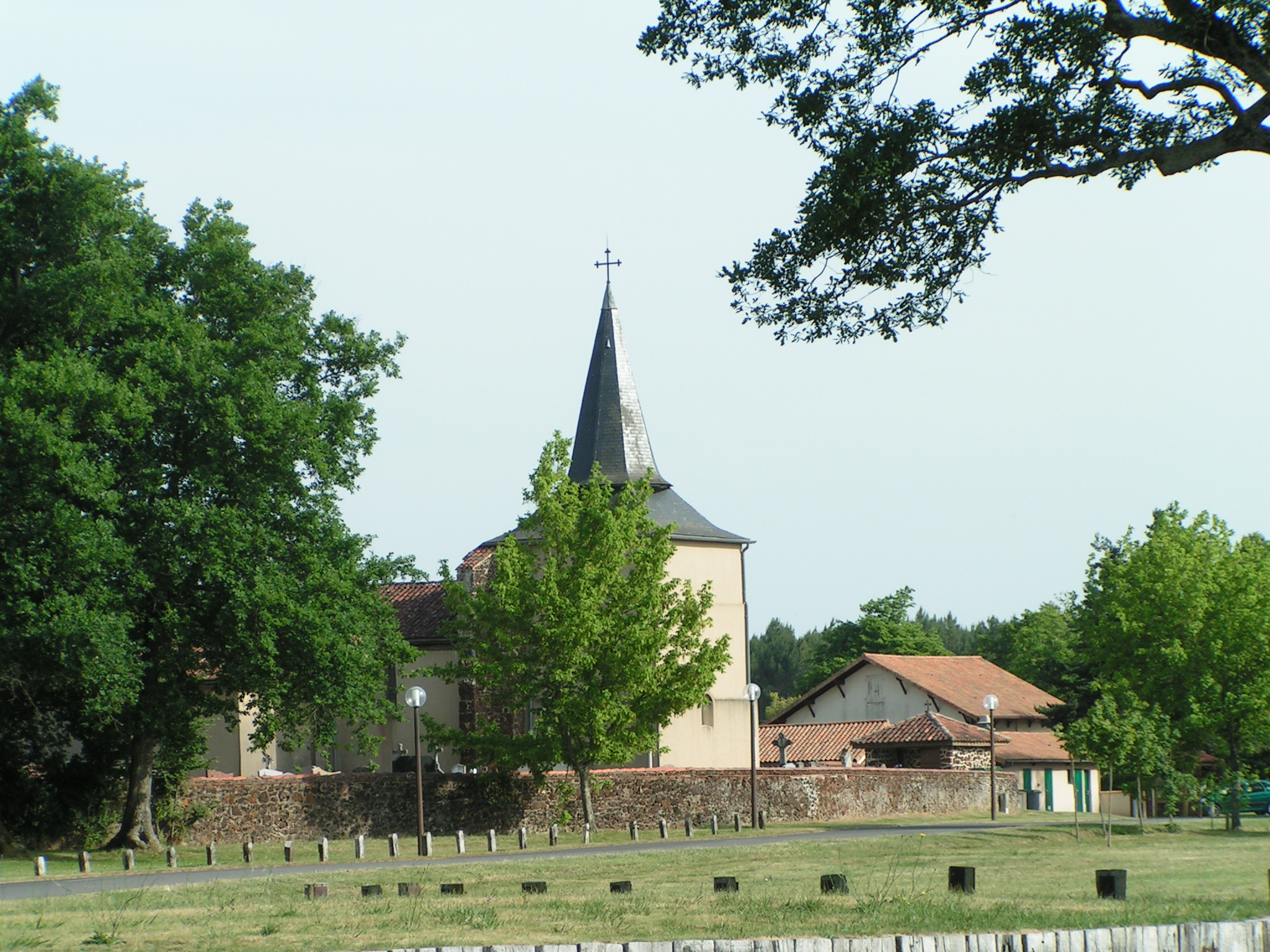 Image personnelle